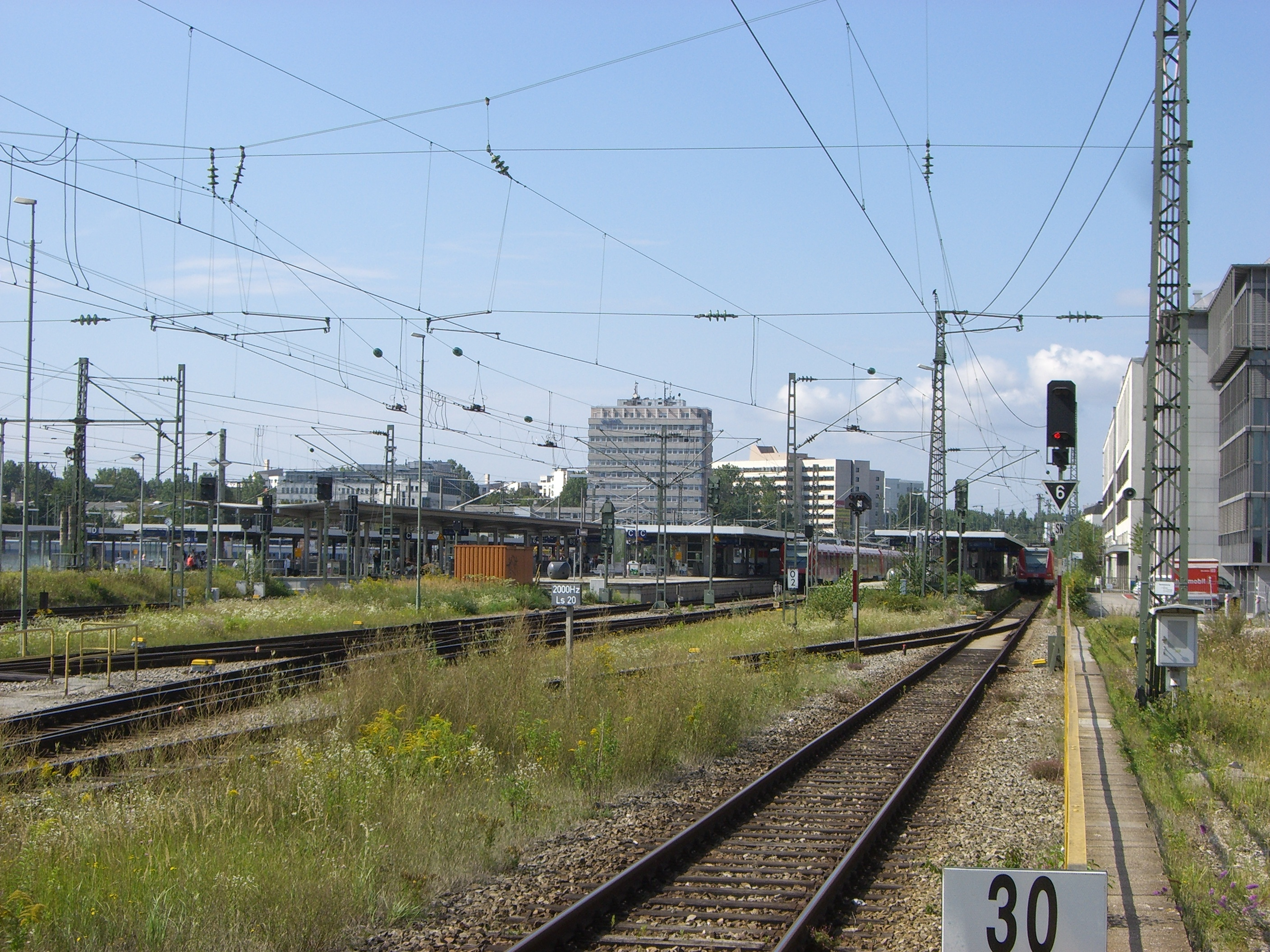 München - Ostbahnhof (Blick auf die S-Bahnsteige).jpg